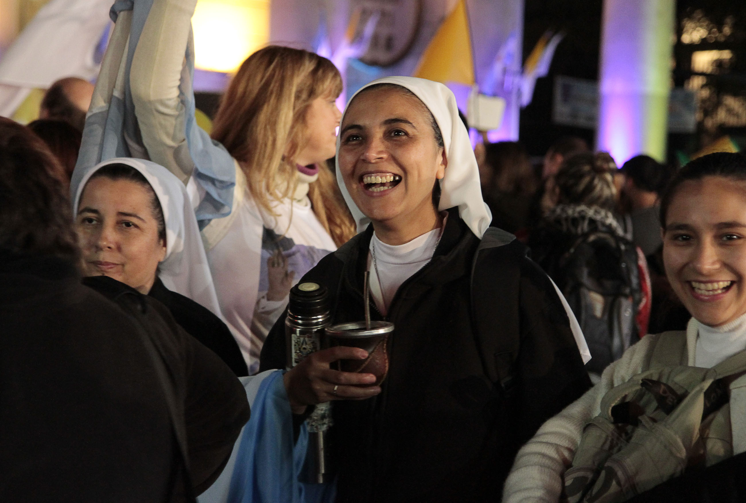 Buenos Aires. Marzo 19 de 2013.- Los fieles que se concentran en las inmediaciones de la Catedral Metropolitana a la espera de la entronización de Francisco como Papa de la Iglesia Católica, disfrutaron de un show artístico musical. Foto: Nahuel Padrevecchi-gv/GCBA